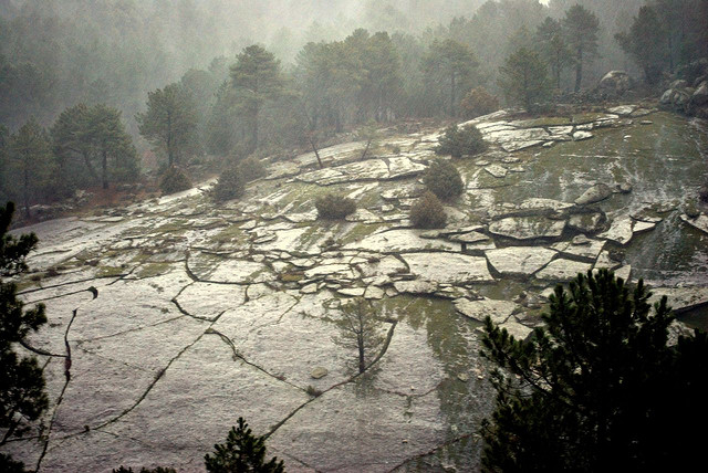 GUISANDO_FLICKR_003-13